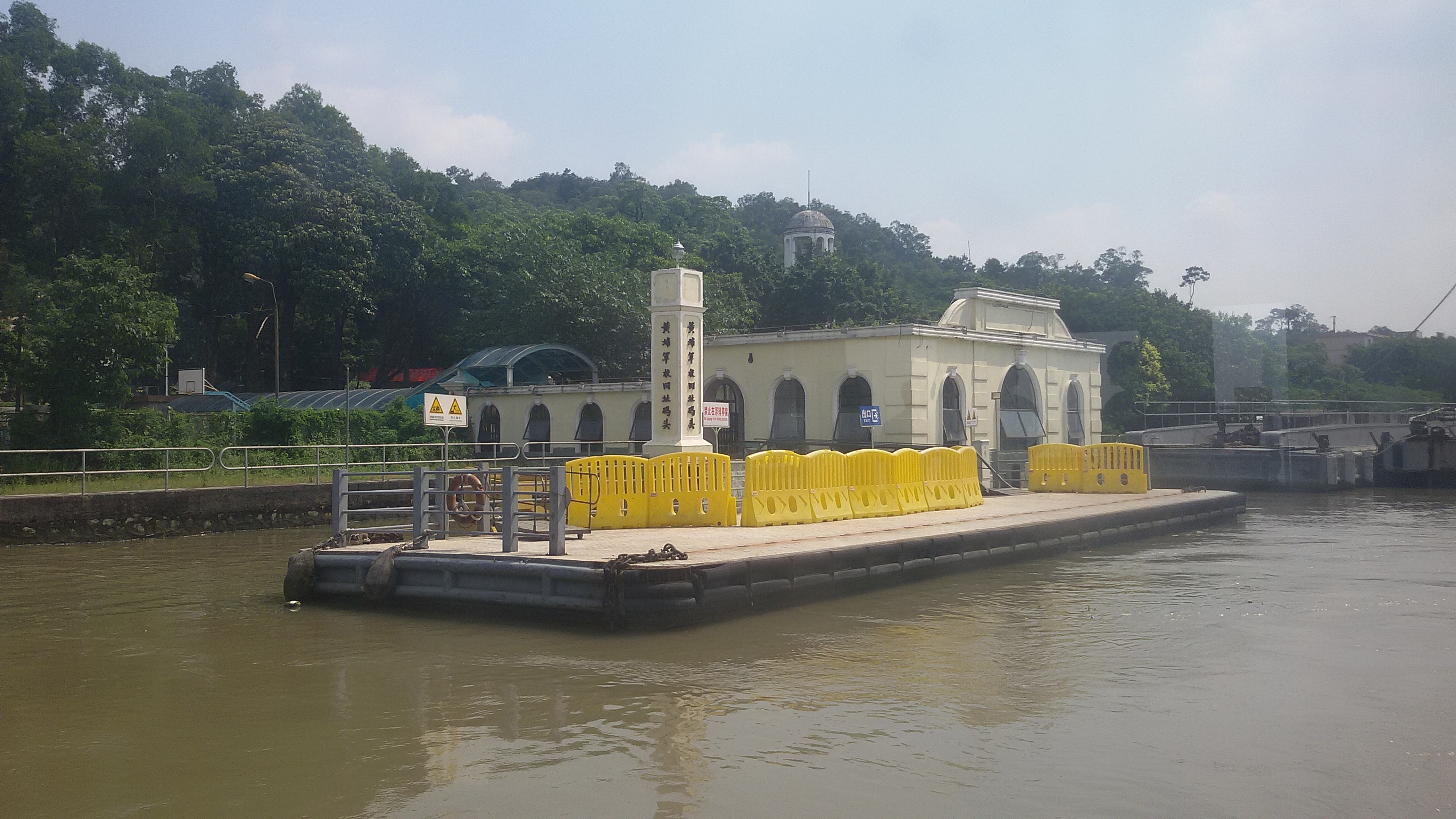 粵語: 黃埔軍校舊址碼頭